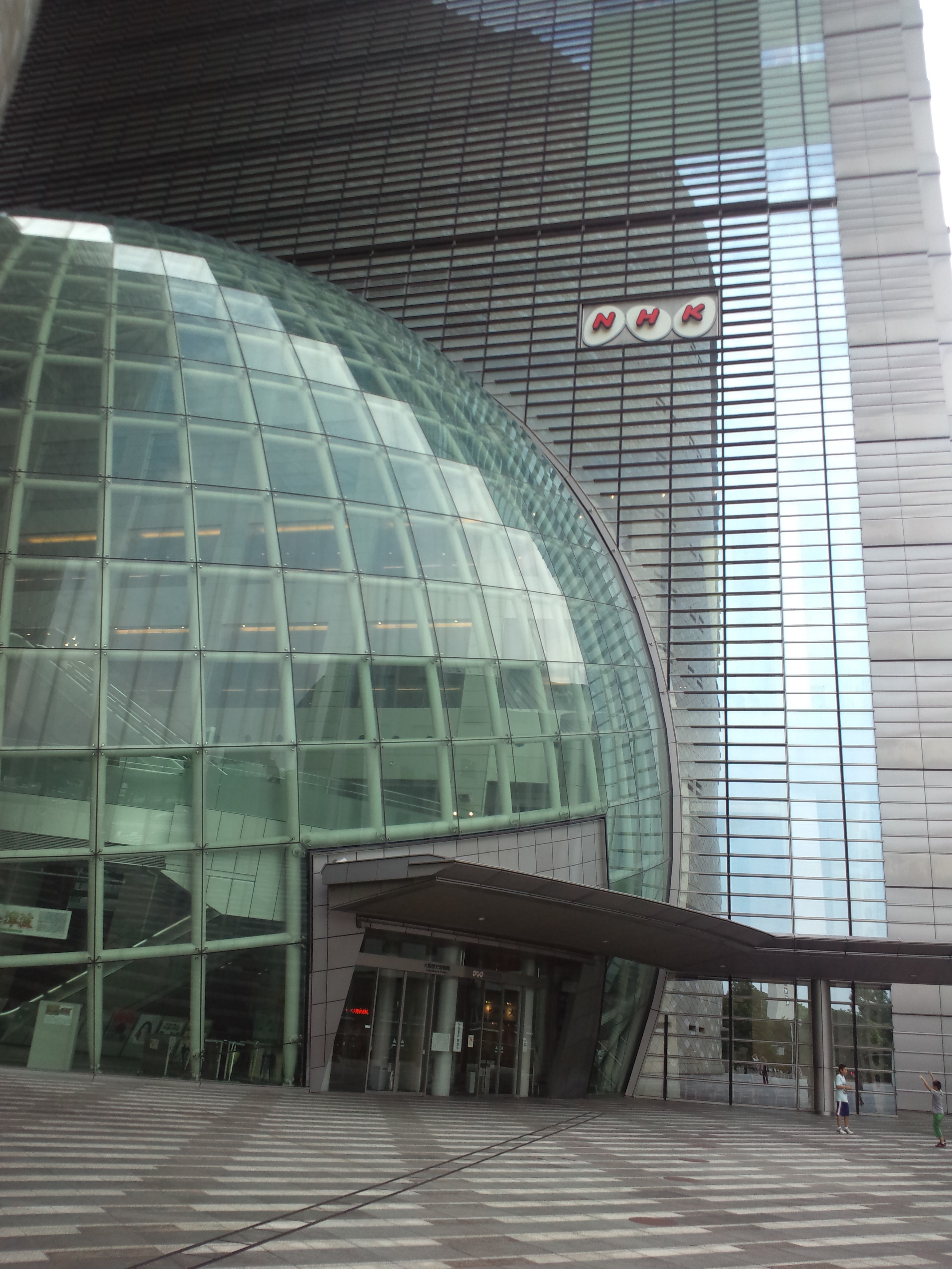 NHK大阪